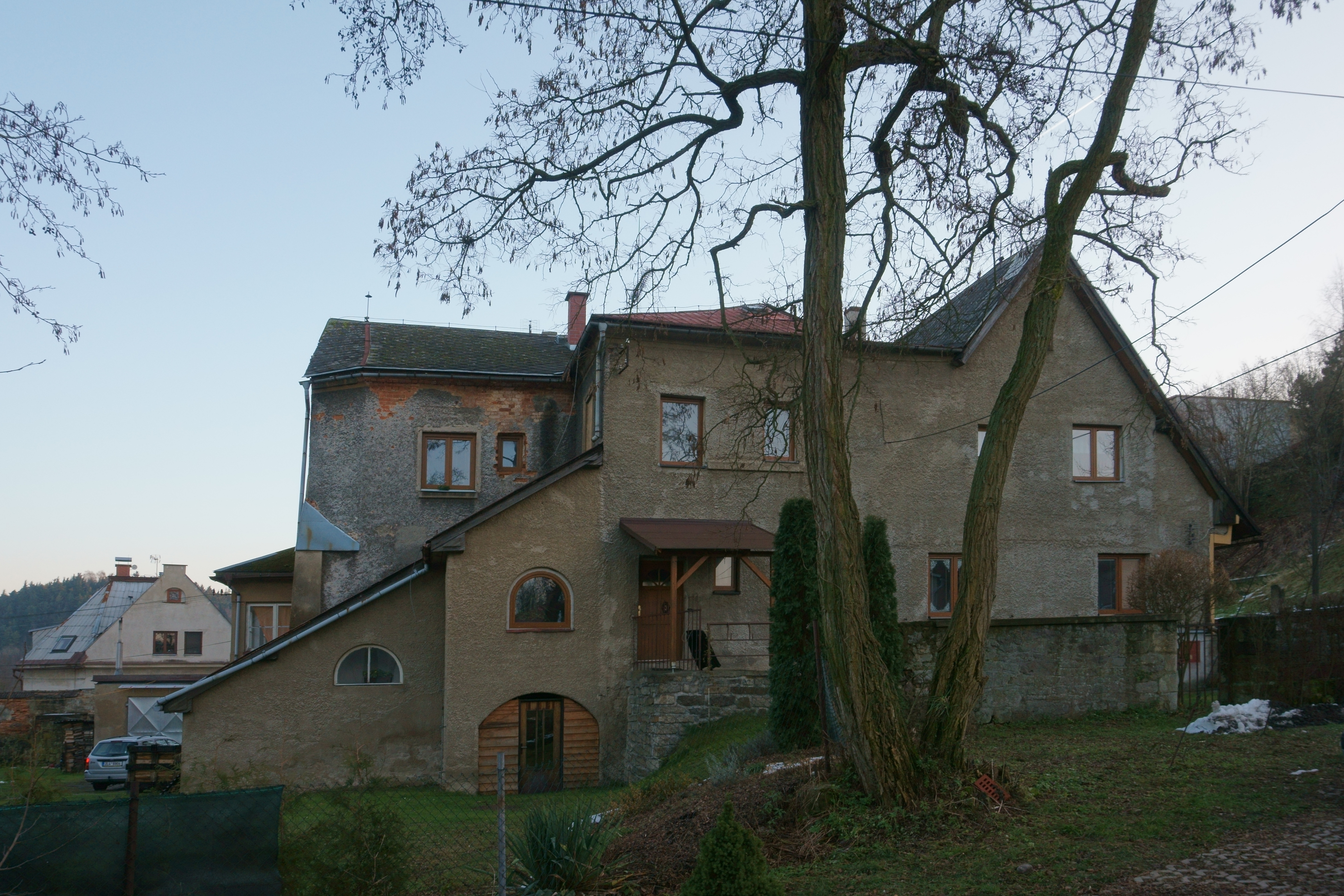 Hodkovice nad Mohelkou - starý pivovar 1